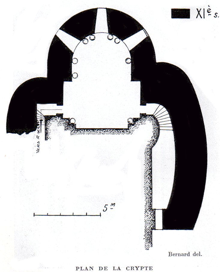 Saint-Romain-le-Puy - Plan de la crypte du prieuré (Congrès archéologique de France 1935)